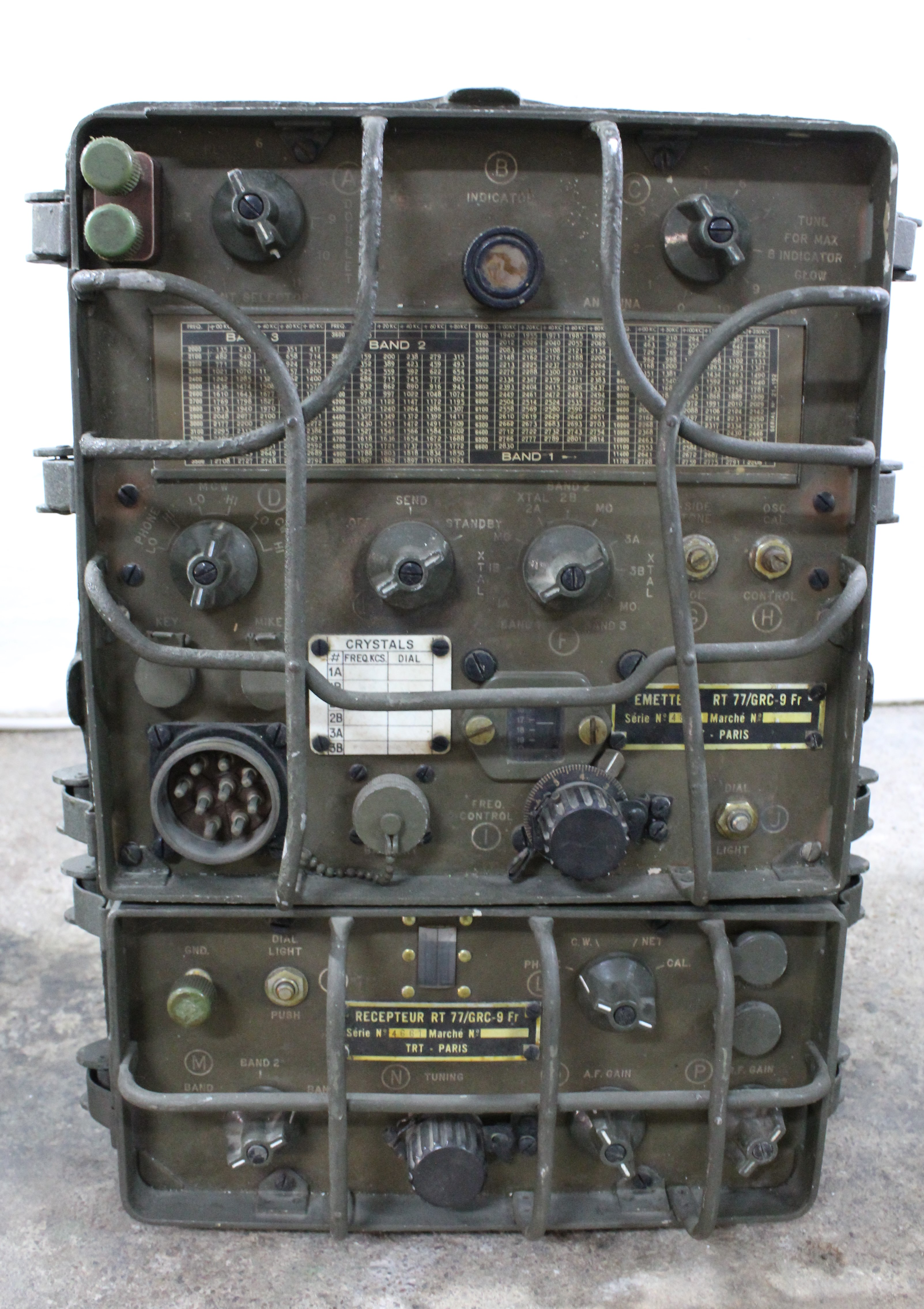 Receptor AN GRC-9